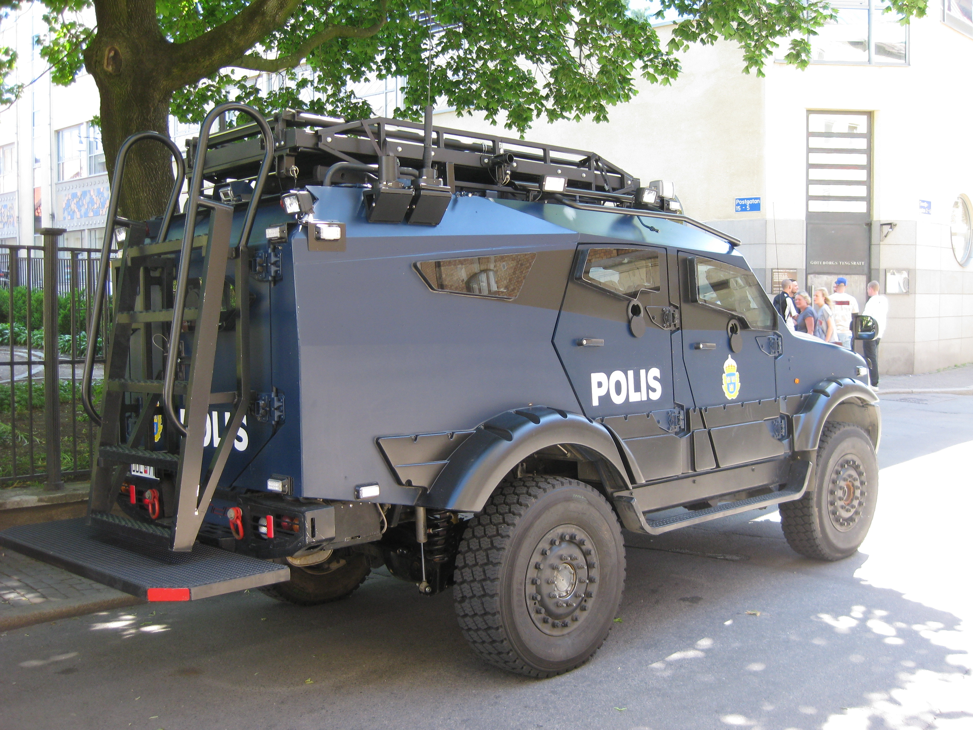 The armoured vehichle "Sandcat". This one belongs to the police of Gothenburg, Sweden.